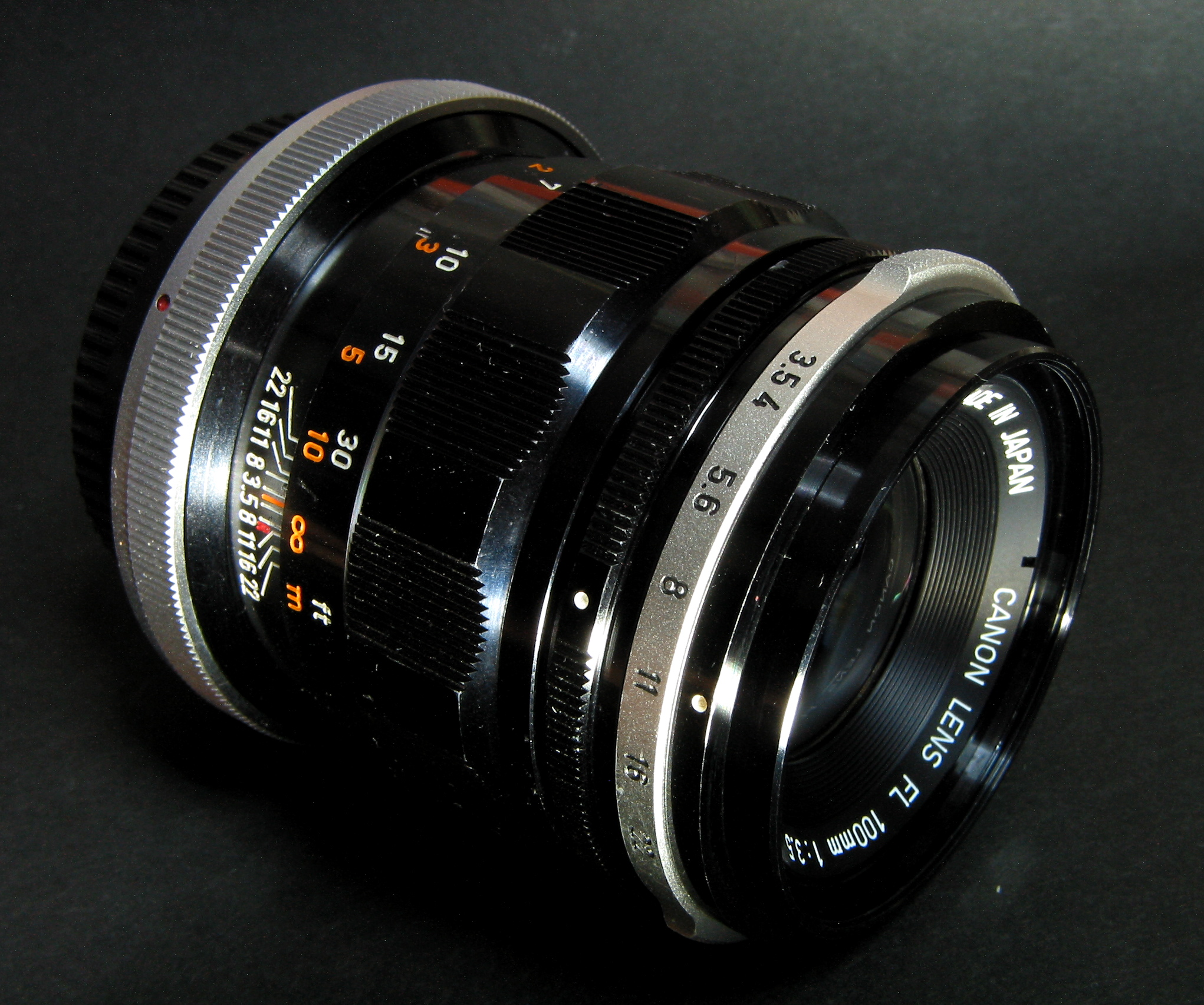 I got new lense :D